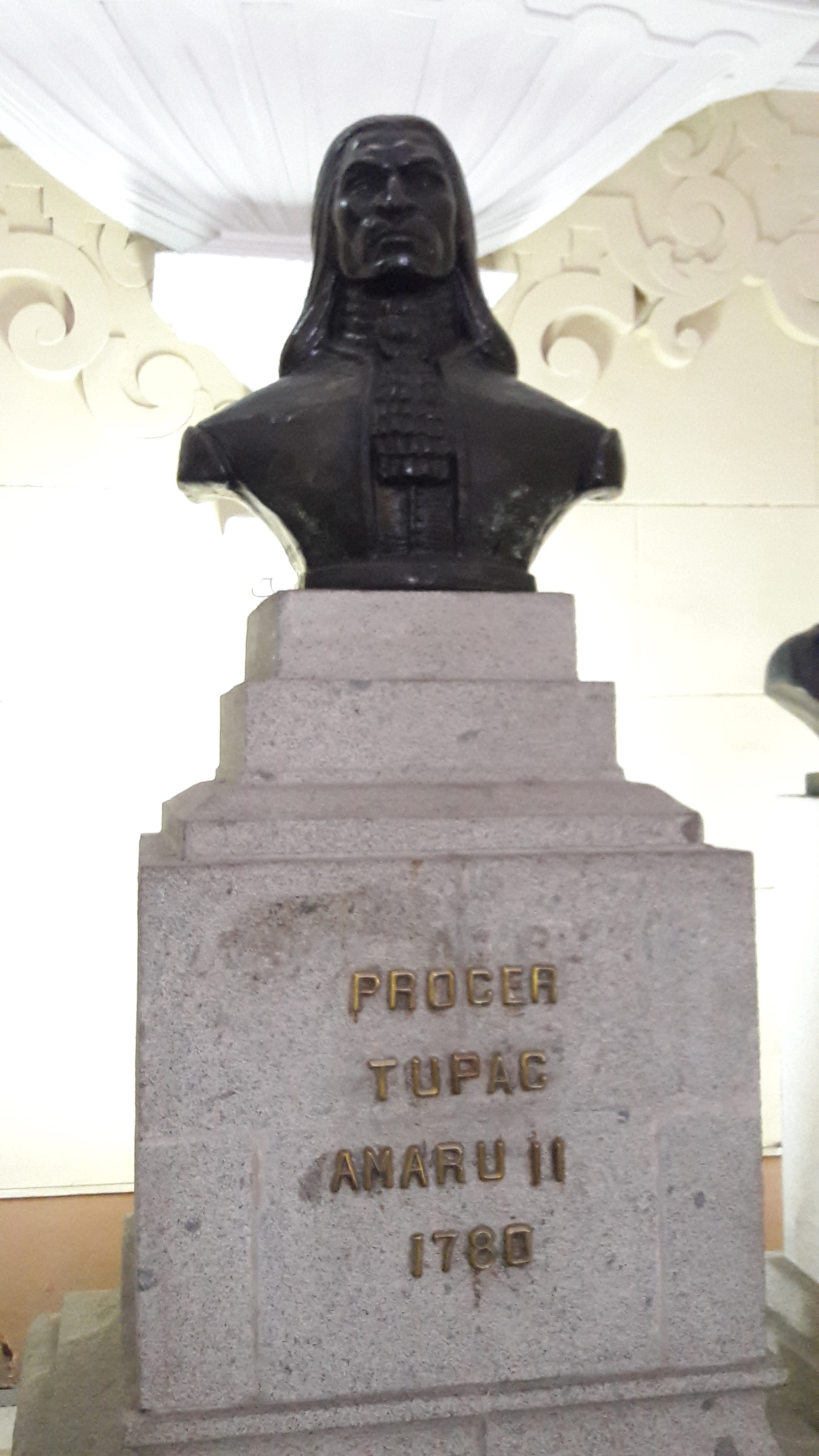 Prócer Tupac Amaru II 1780